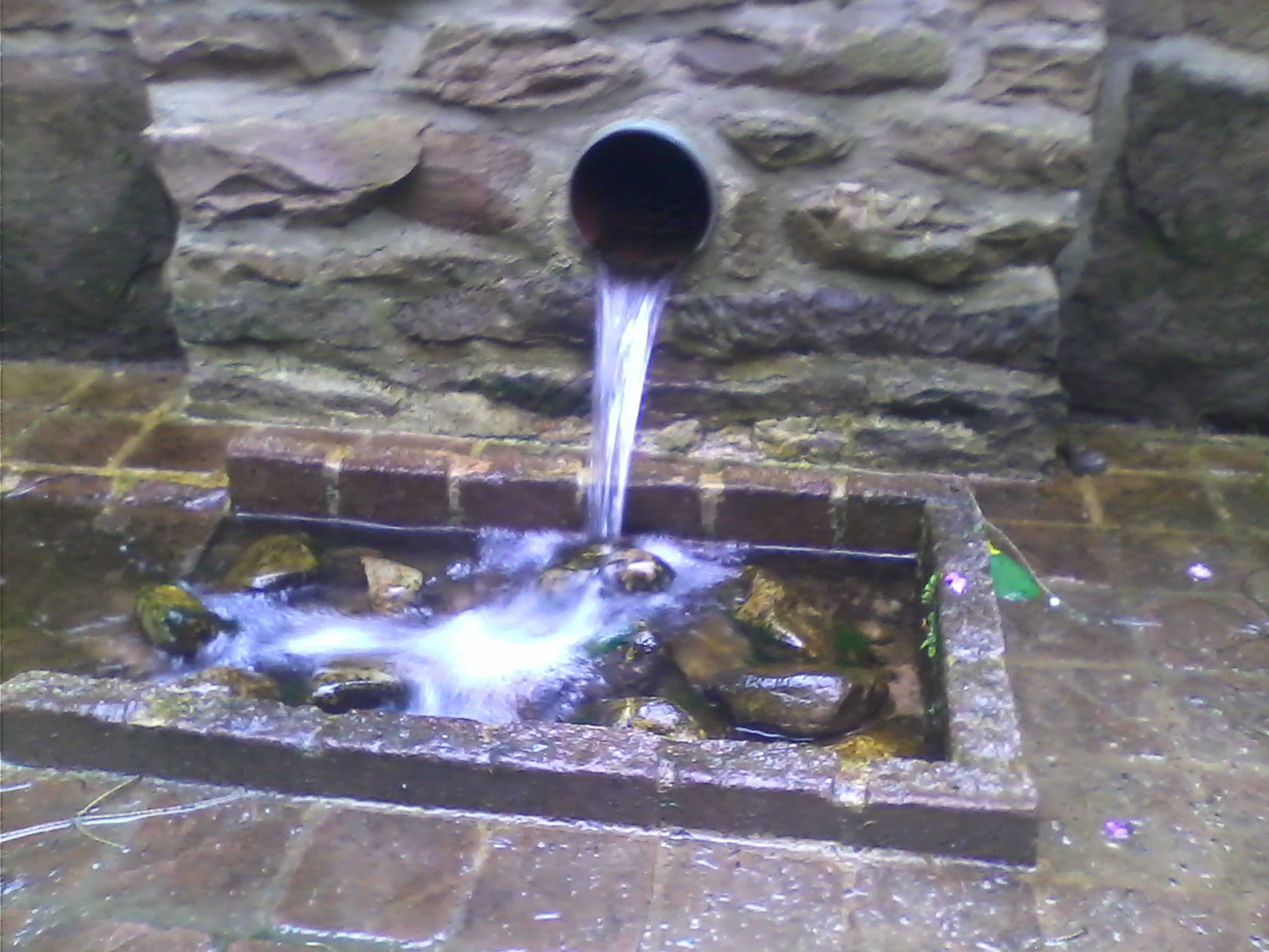 Klingenberg-Quelle: Austritt des Quellwassers